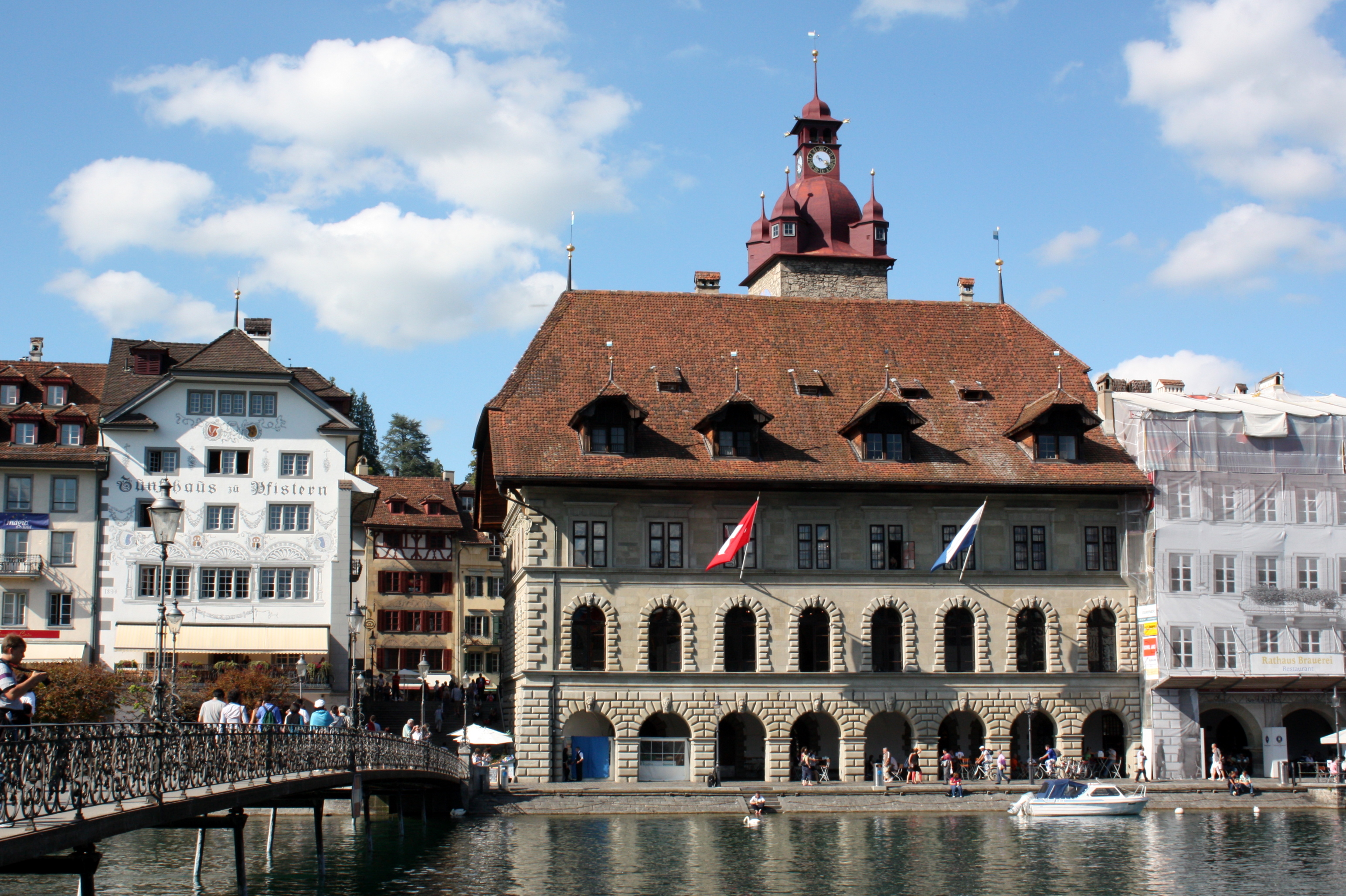 Rathaus, Luzern